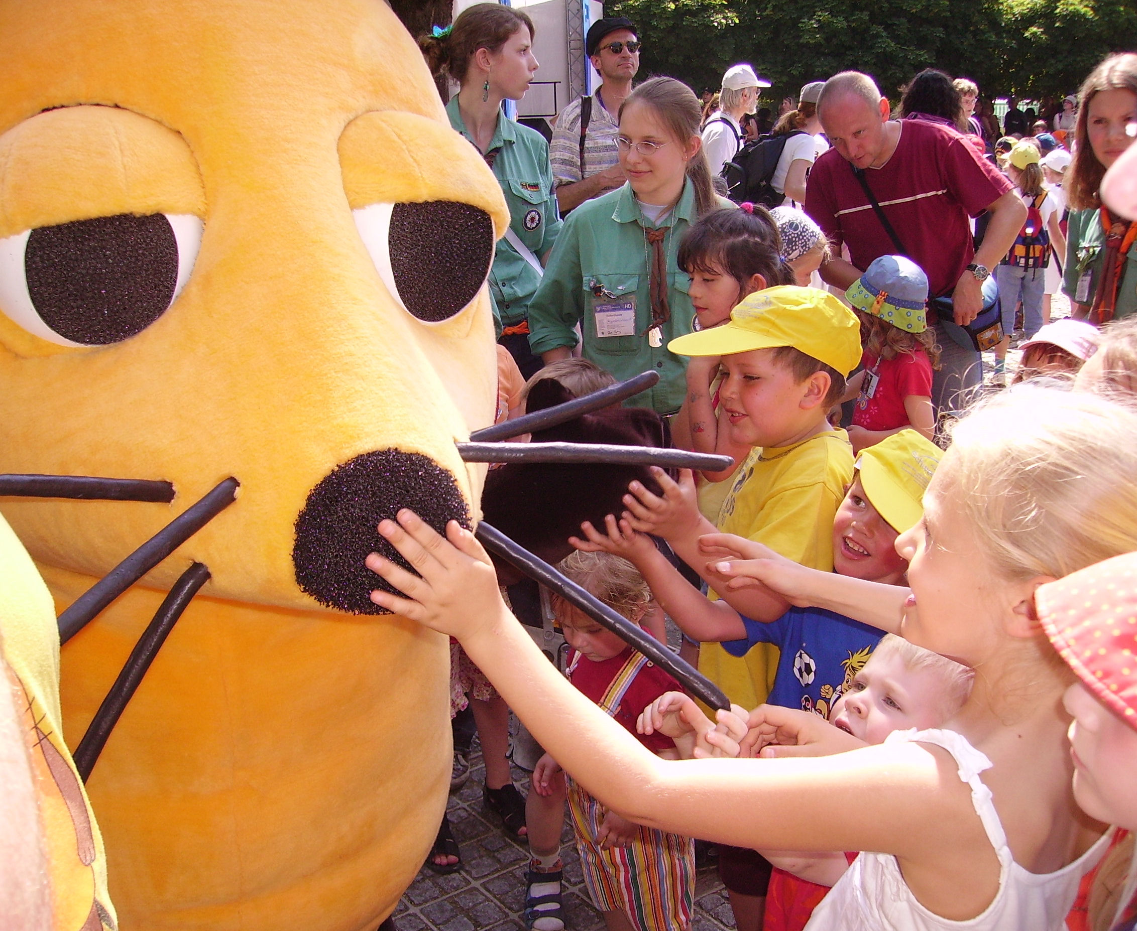 Die Maus auf dem Deutschen Evangelischen Kirchentag in Köln 2007